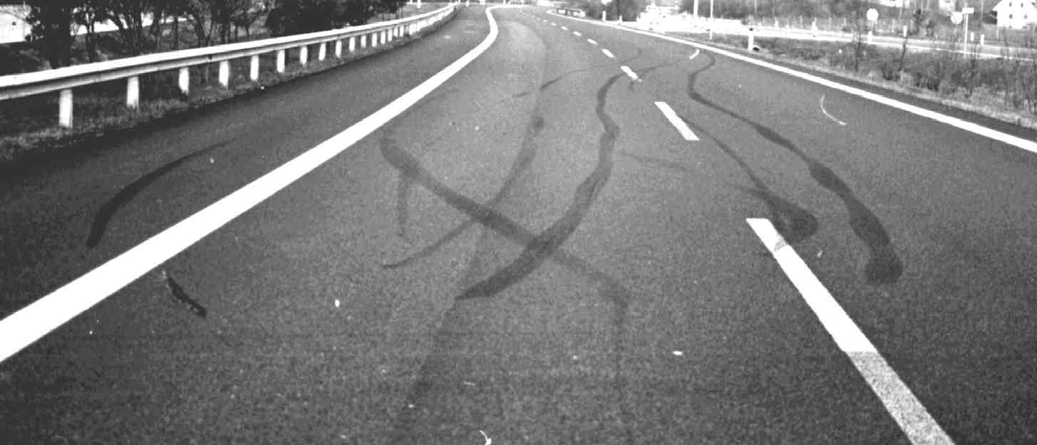 Bremsspuren auf asphaltierter Straße